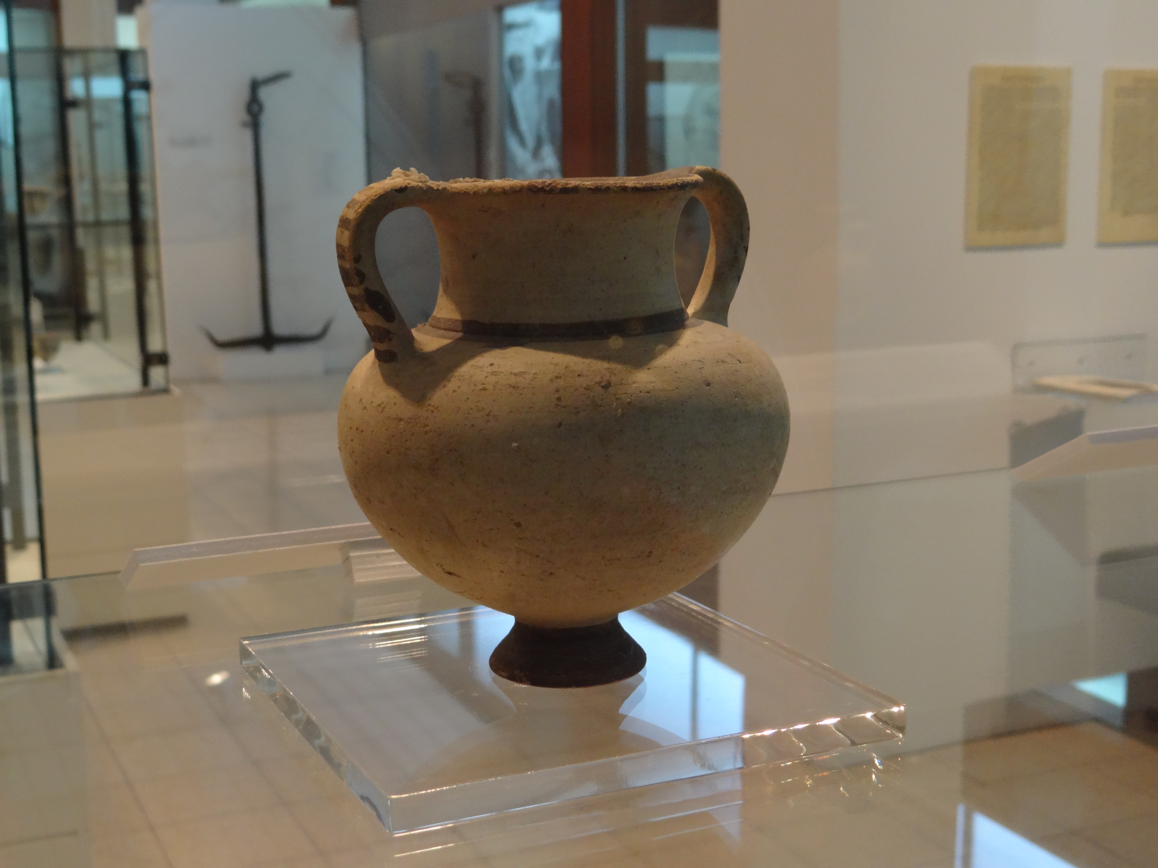 Cypriotic White Painted Ware from Iron Age, Israeli National Maritime Museum, Haifa משפחת כלים "המצויירים על לבן" מתקופת הברזל . כלים אלה נמצאו מחוץ לקפריסין במכלולים מהמאה ה11 וה-10 לפני הספירה אוסף המוזיאון הימי הלאומי קנקנית קבוצת הכלים המצויירים לבן 1